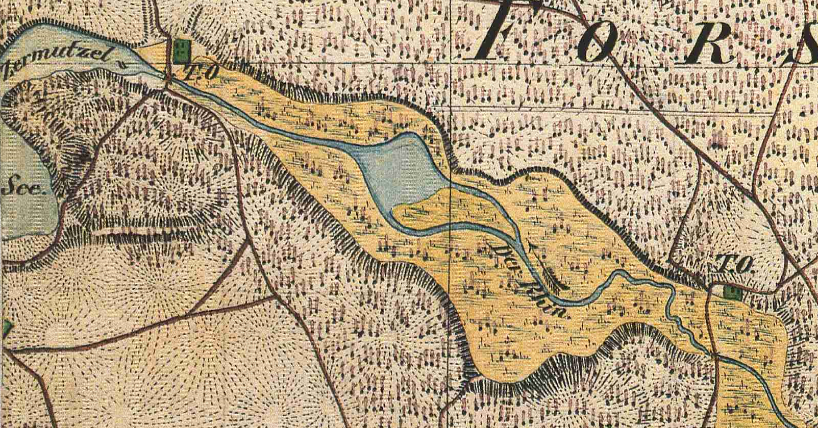 Die abgegangenen Teeröfen Fristow (am Zermützelsee) und Krangensbrück (südöstlich davon), heute Stadt Neuruppin, Landkreis Ostprignitz-Ruppin, Brandenburg, Ausschnitt aus dem Urmesstischblatt 2943 Rheinsberg von 1825